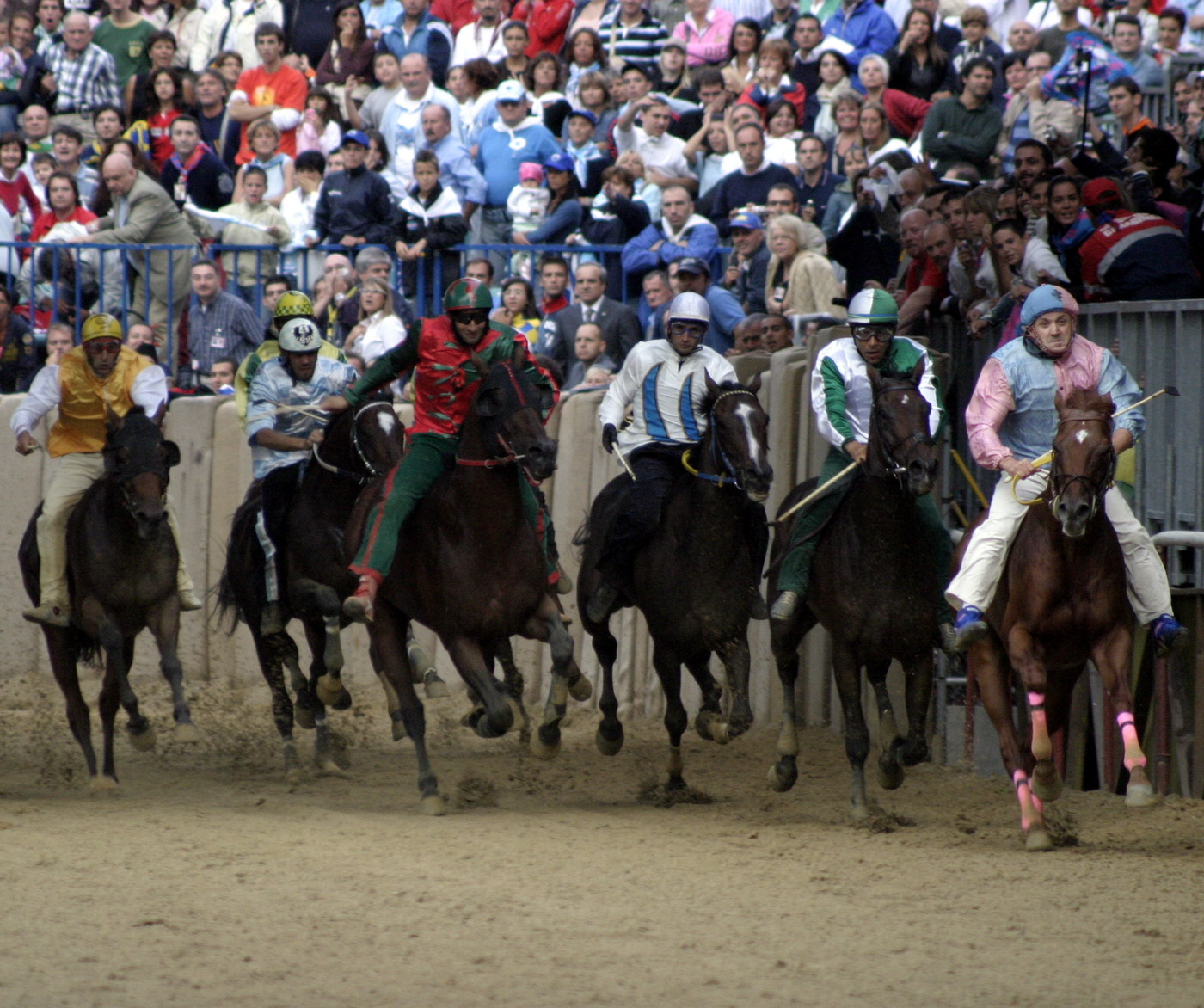 Asti, Il Palio un momento della Corsa